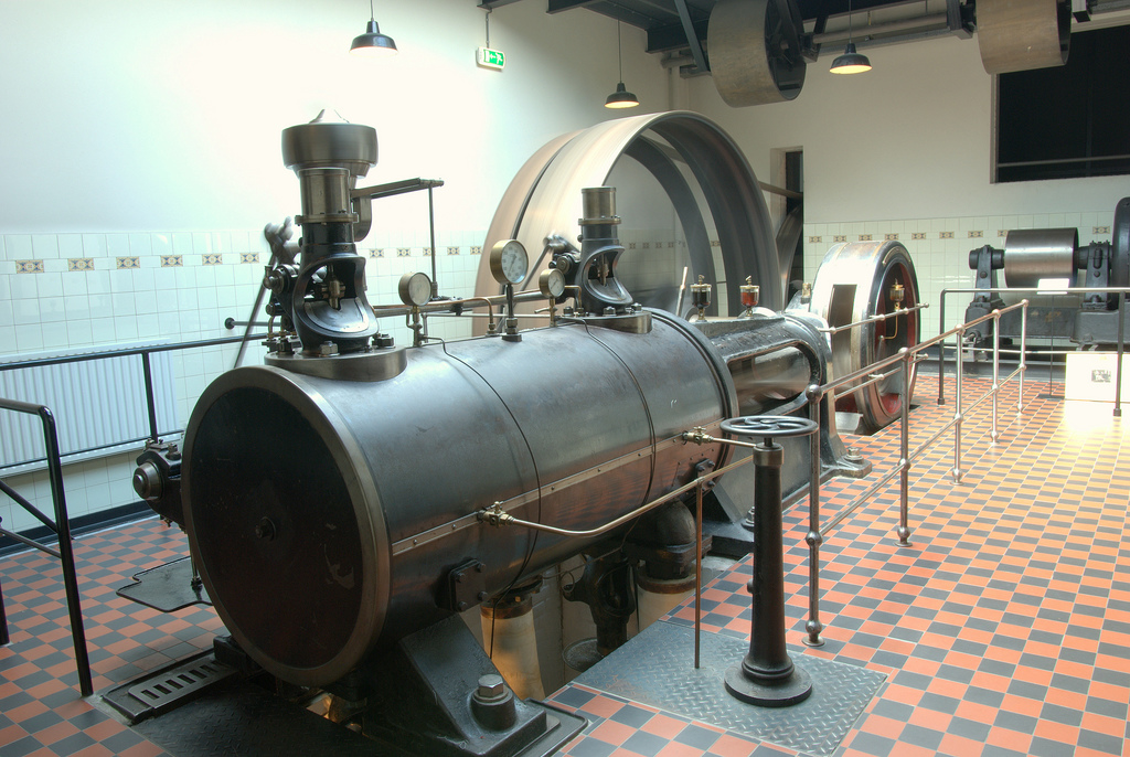 Stoommachine, Louis Smulders & Co. (Utrecht), 1906 (07161) Stoommachine, Louis Smulders & Co. Utrecht, 1906 (07161)2